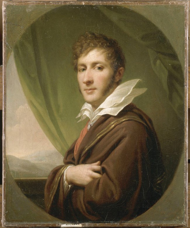 Belarusian (Taraškievica orthography): Партрэт Францішка Сапегі (Francišak Sapieha)title QS:P1476,be-tarask:"Партрэт Францішка Сапегі (Francišak Sapieha)" label QS:Lbe-tarask,"Партрэт Францішка Сапегі (Francišak Sapieha)"